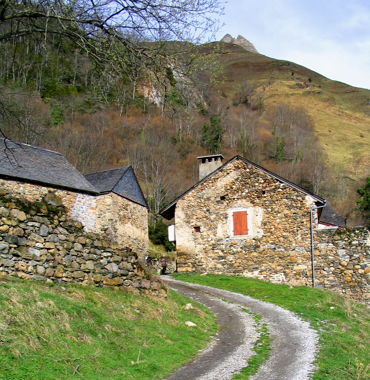 Hameau de Listo - Pyrénées Atlantiques - France Auteur: P.Charpiat 2007